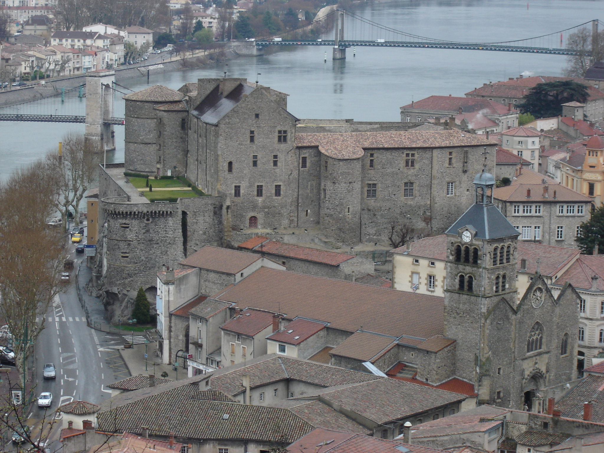 Château de Tournon-sur-Rhône / Tournon-sur-Rhône : the castle